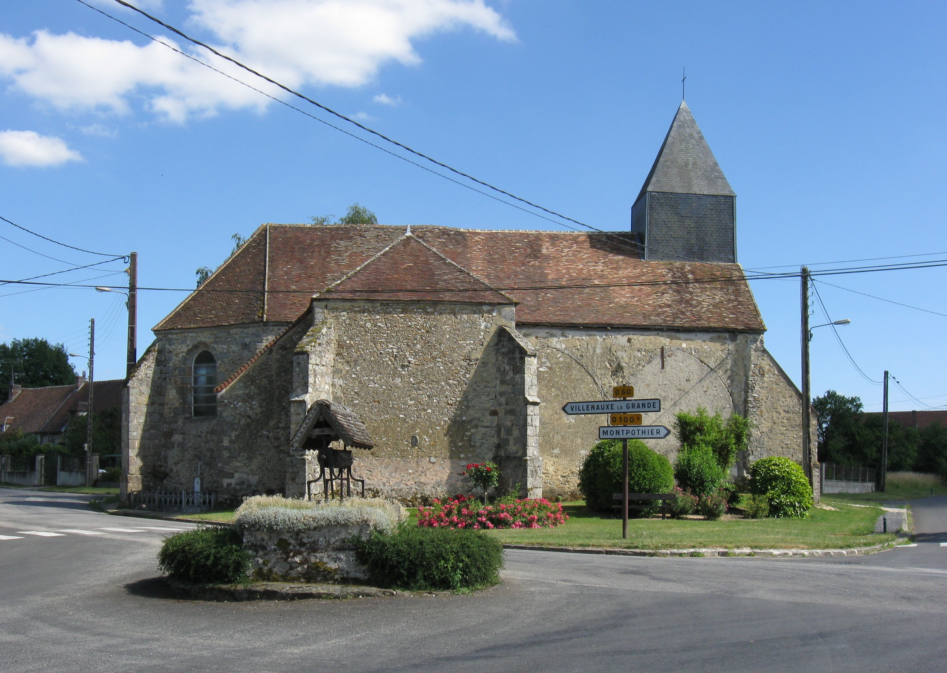 Église Saint-Jean-Baptiste de Fontaine-sous-Montaiguillon. (Louan-Villegruis-Fontaine, Seine-et-Marne, région Île-de-France).